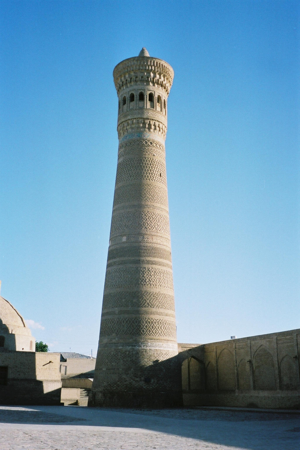 Le grand minaret (1127) (Kalon = grand) est, dit-on, le seul édifice épargné par Gengis Khan et est donc l'un des bâtiments les plus anciens de Boukhara. Il fait 47 m de haut, ses fondations sont profondes de 10 m et posées sur des poutres de bois pour servir de joint antisismique.